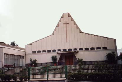 Chiesa parrocchiale San Ponziano di Roma (Diaconia)